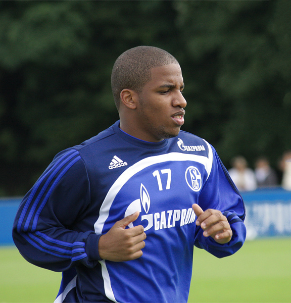 Jefferson Farfan während einer Trainingseinheit am 12.07.2008 auf dem Trainingsgelände des FC Schalke 04